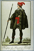 História: Oficial de Justiça na Europa